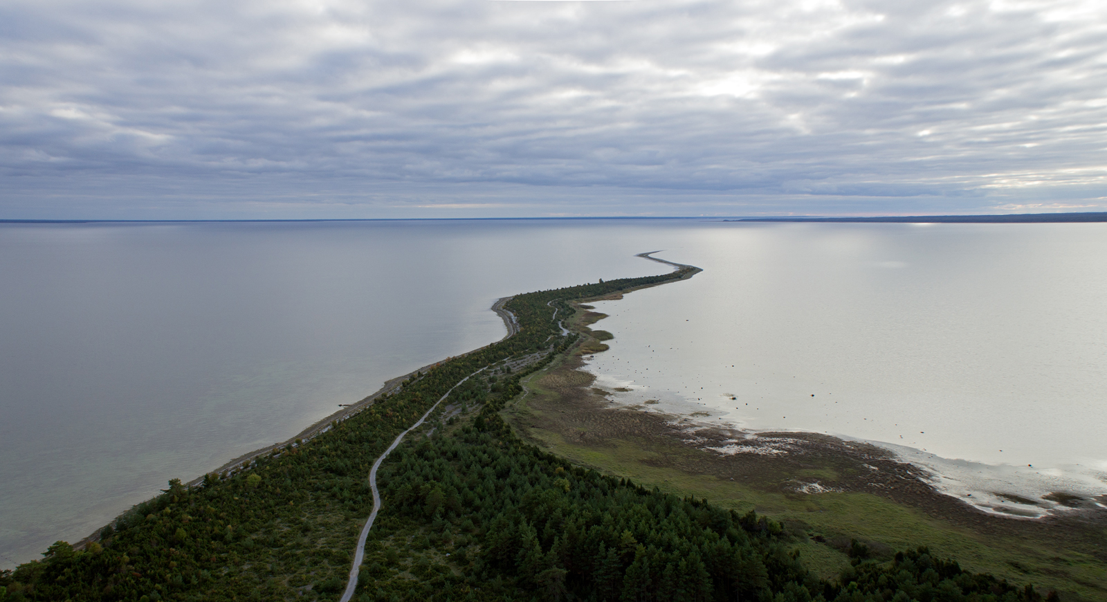 Sääretirp